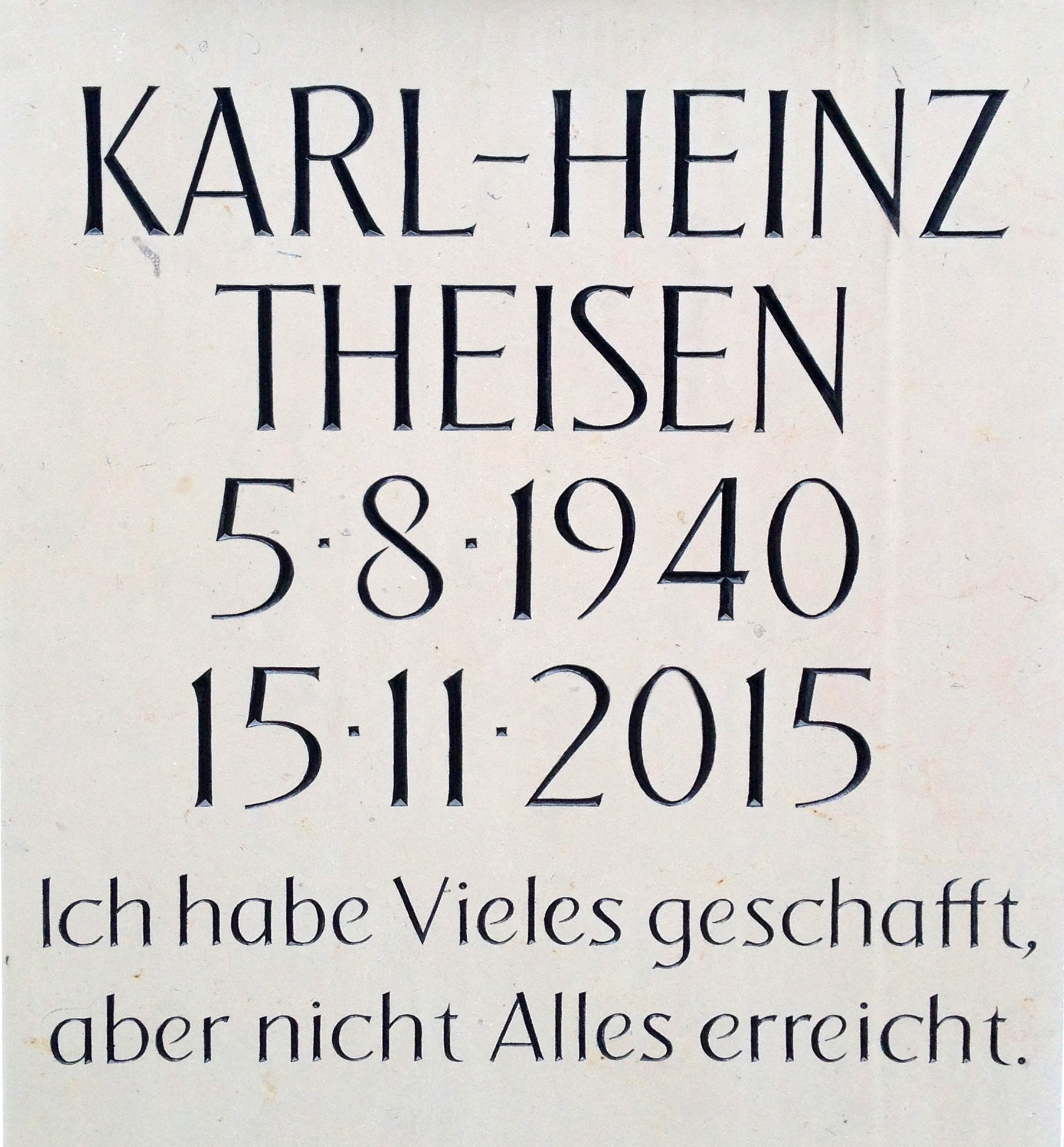 Inschrift auf Stele Grab von Karl-Heinz Theisen, Nordfriedhof Düsseldorf